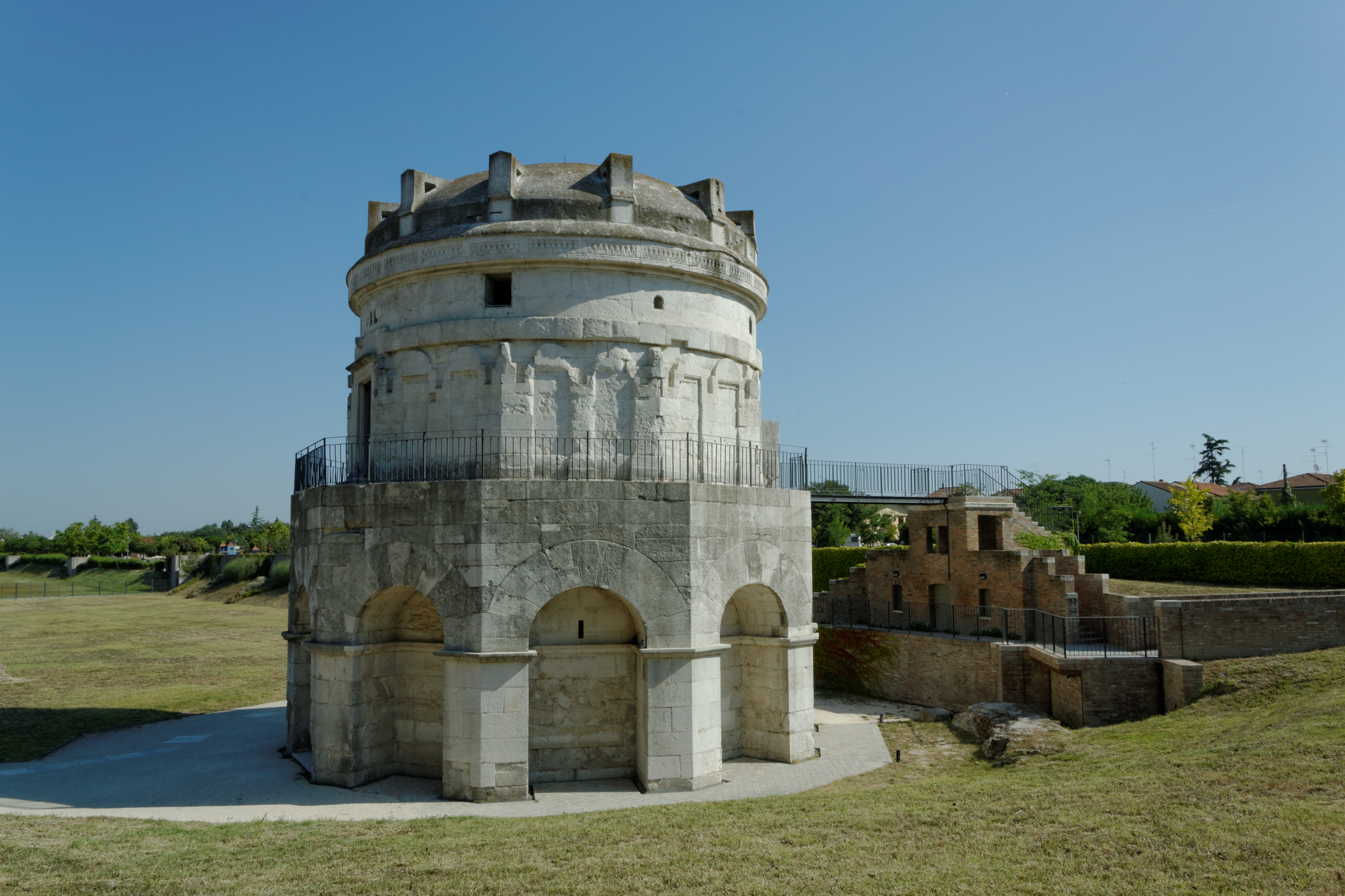 Mausoleo di Teodorico. Ravenna. Foto: Dritan Mardodaj.